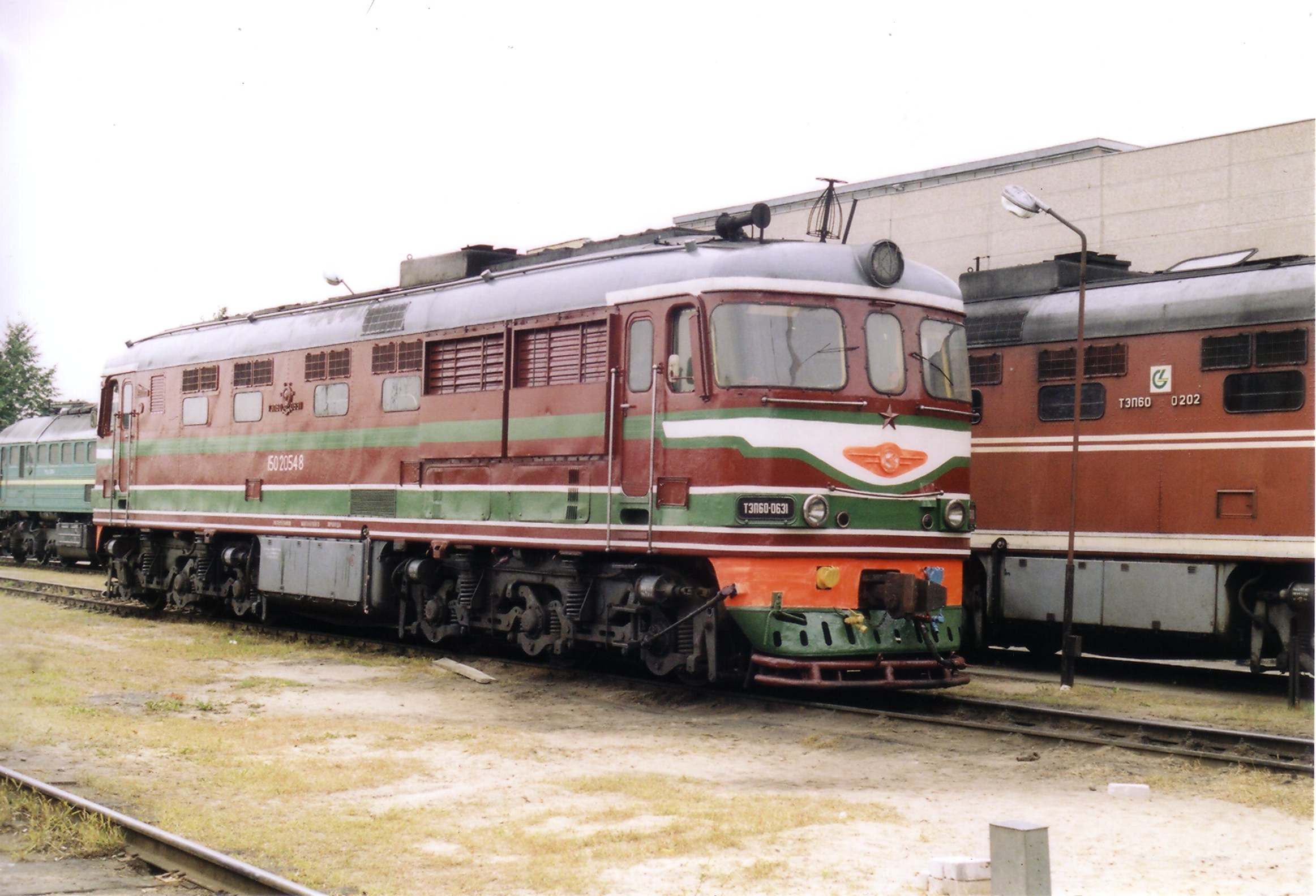 TEP60 in Vilnius depot none